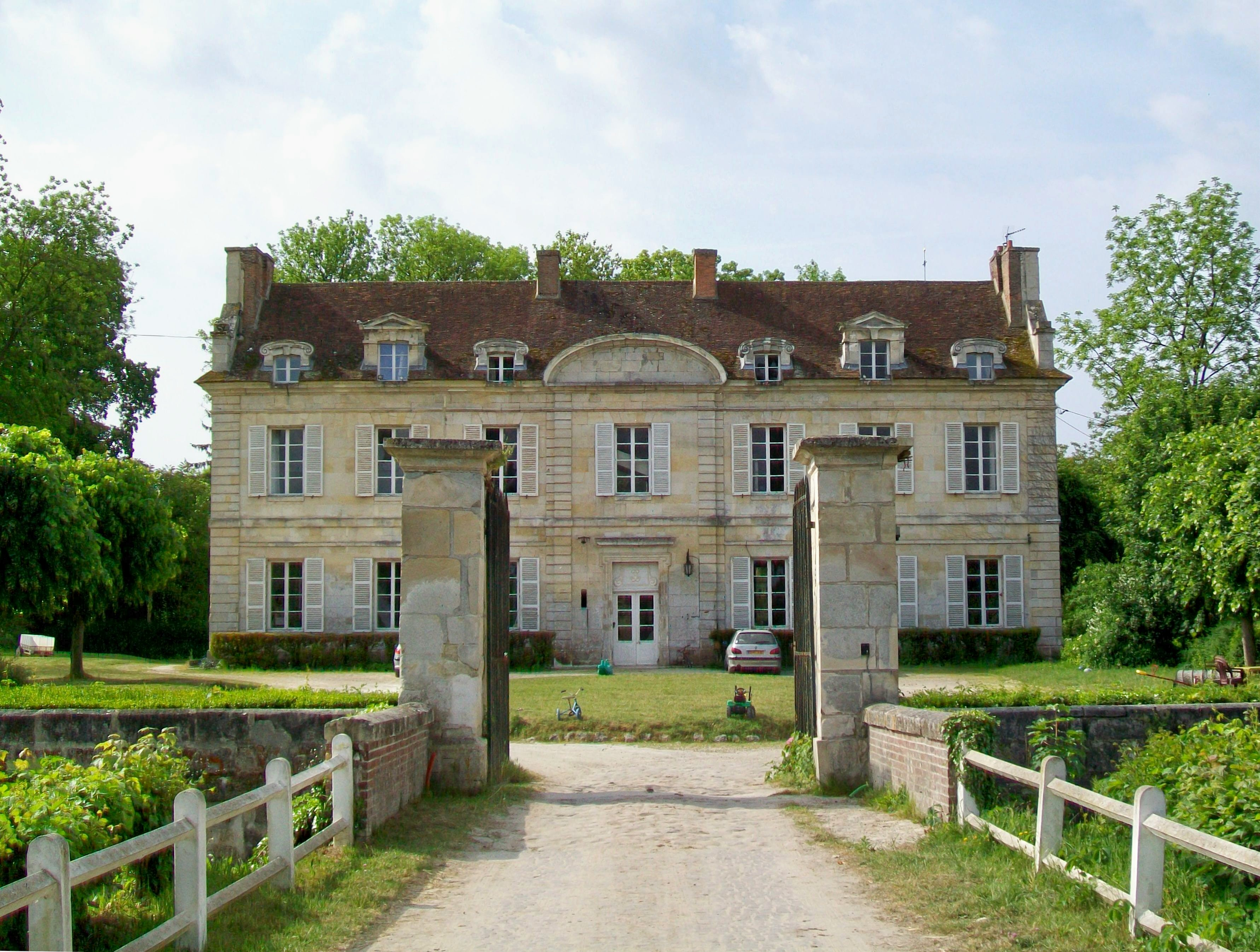 Le château de Coye-la-Forêt, façade nord des années 1760/70.